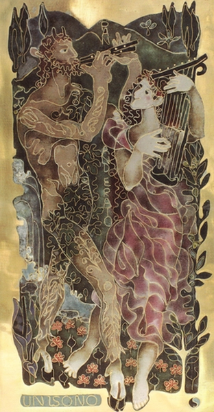 Margarete Seeler: Unisono (Silber-Cloisonné auf Kupfer).